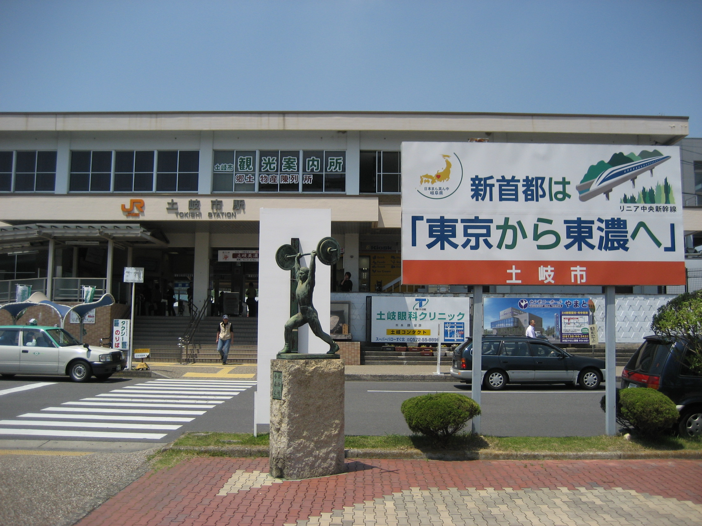 JR Tokishi Sta.